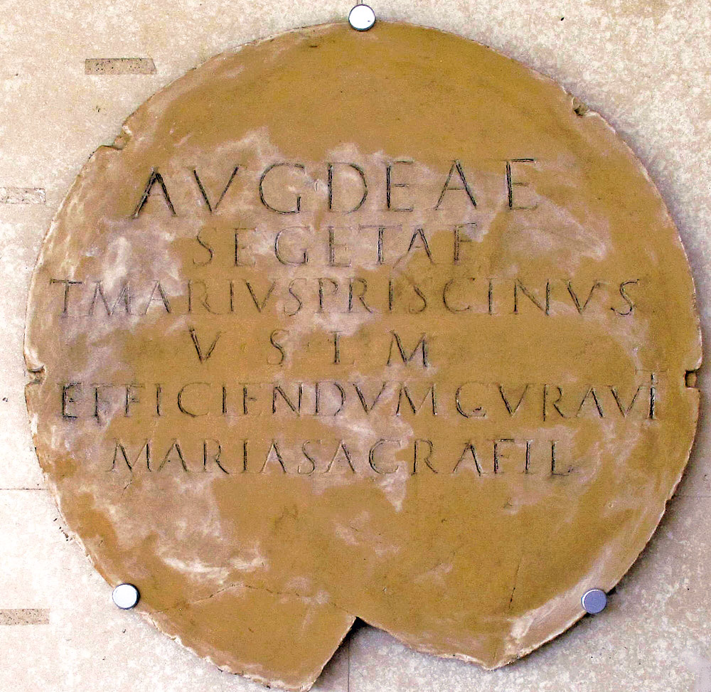 Marbre gallo-romain, plaque circulaire, Aquis Segueste, Sceaux en Gatinais, France